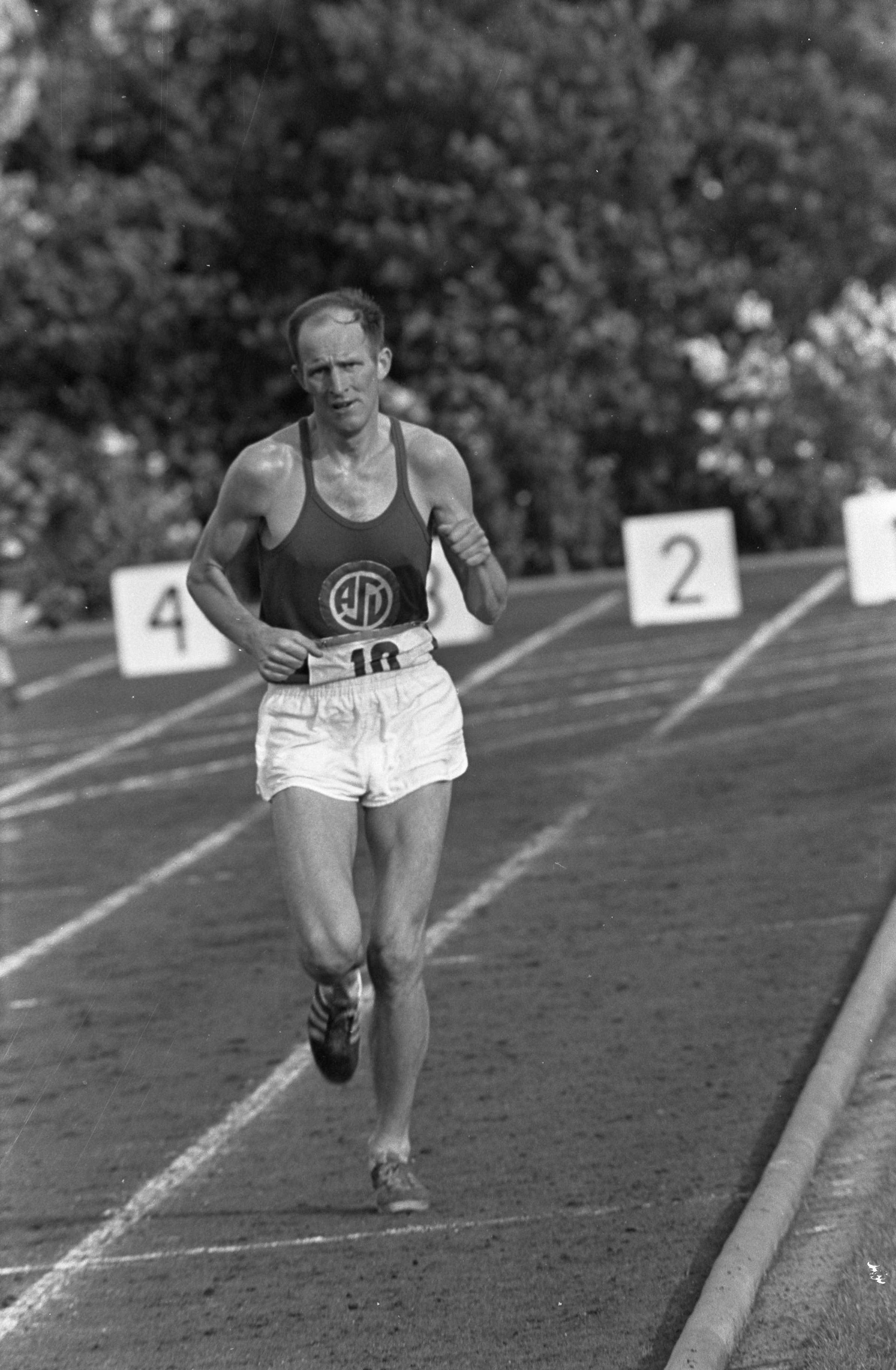 Collectie / Archief : Fotocollectie Anefo Reportage / Serie : Nederlandse kampioenschappen atletiek 1968 Beschrijving : Aad Steylen, lopend op de sintelbaan tijdens de marathon Datum : 31 augustus 1968 Locatie : Friesland, Leeuwarden Trefwoorden : atletiek, marathon, portretten, sport Persoonsnaam : Steylen, Aad Fotograaf : Fotograaf Onbekend / Anefo Auteursrechthebbende : Nationaal Archief Materiaalsoort : Negatief (zwart/wit) Nummer archiefinventaris : bekijk toegang 2.24.01.05 Bestanddeelnummer : 921-6410